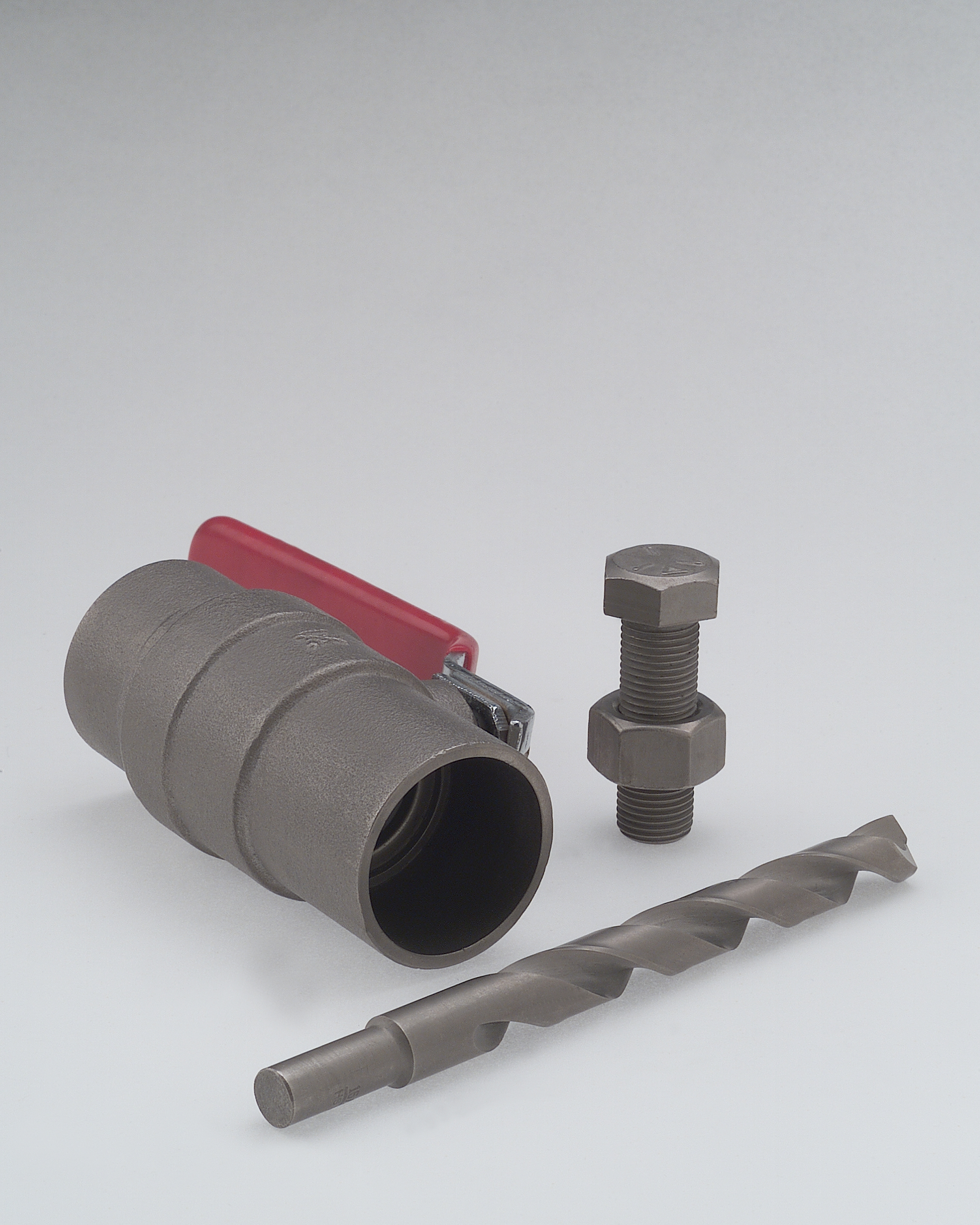 photos electroless nickel